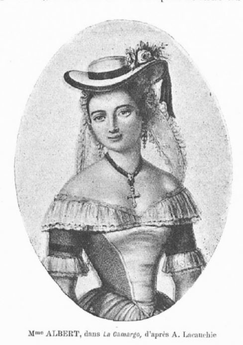 Madame Albert, comédienne (1805-1860) (Lithographie A. Lacauchie